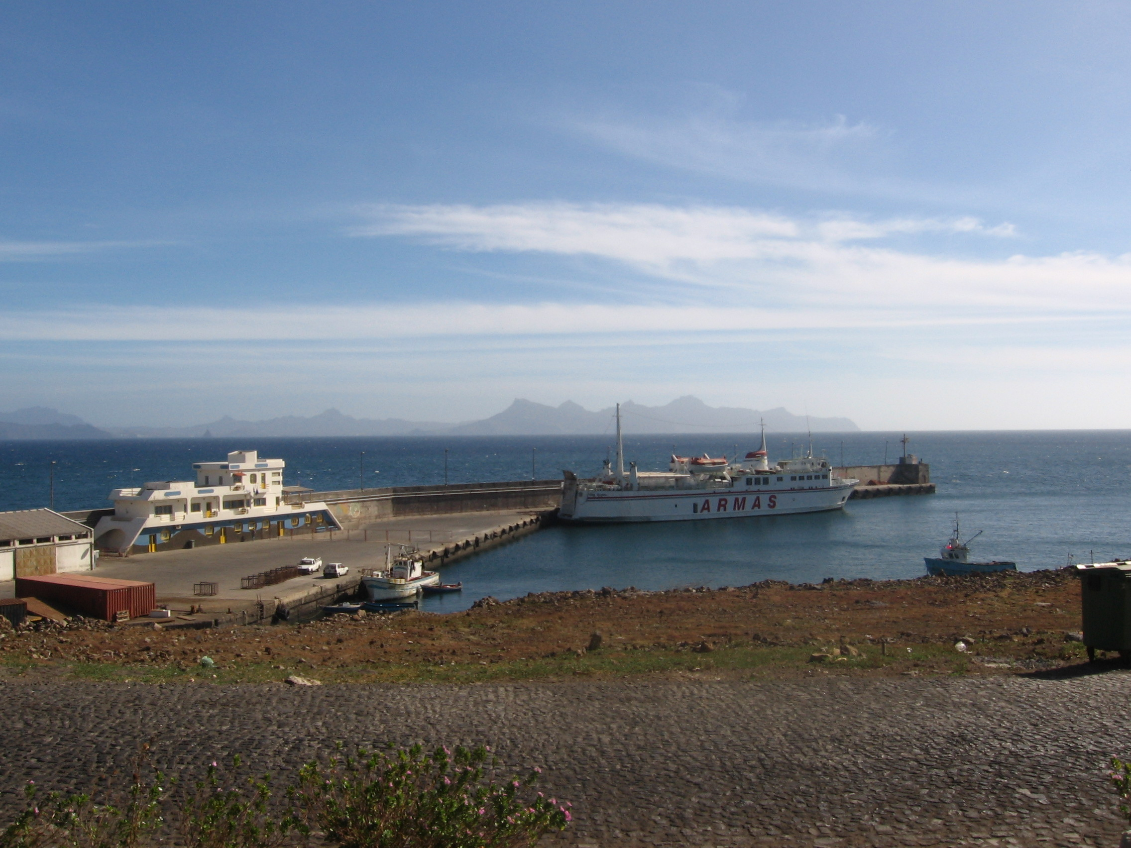 Cais de Porto Novo, Santo Antão, Cabo Verde. Ao fundo a ilha de São Vicente